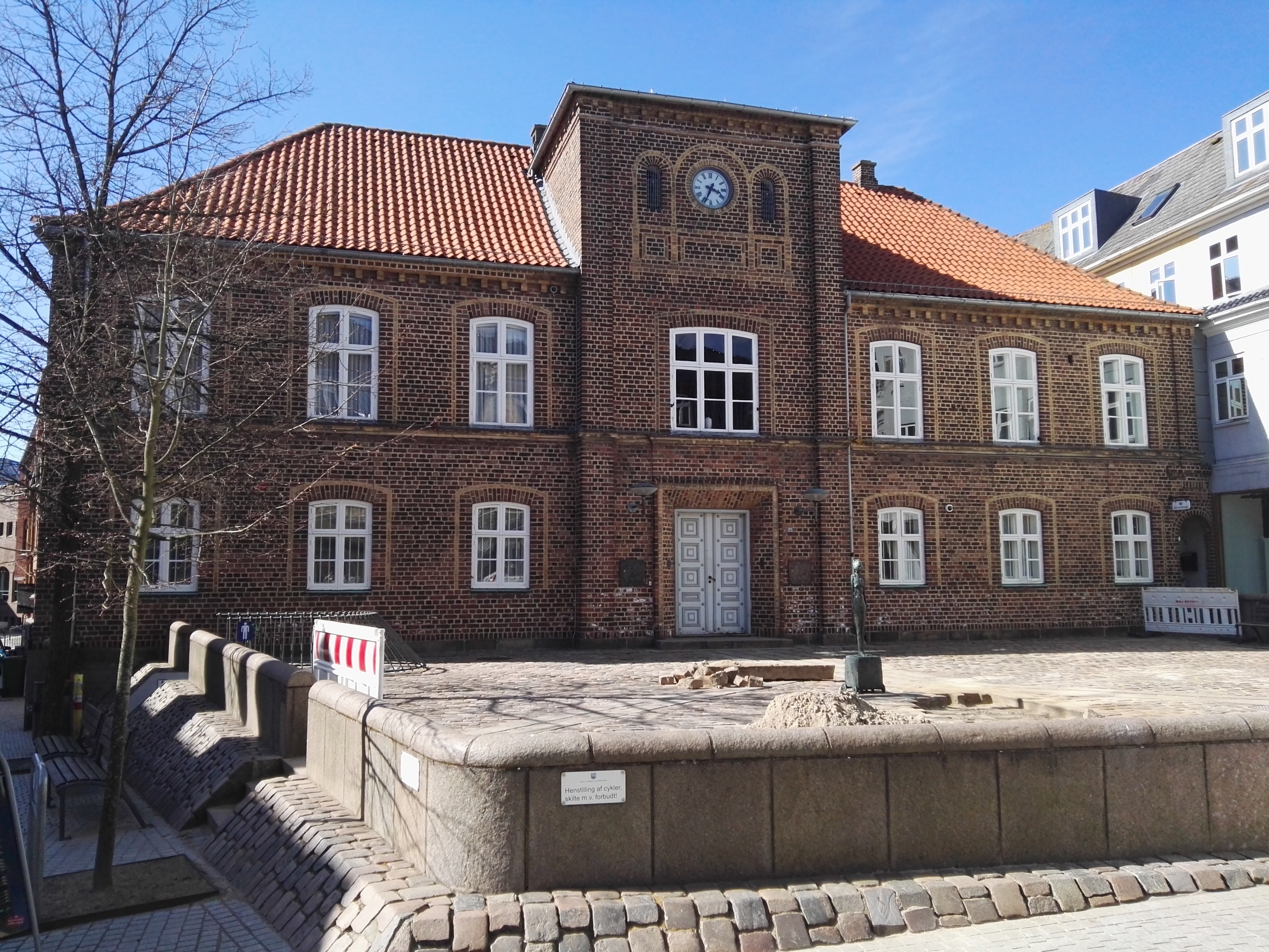 Holstebro Købstads gamle rådhus på Nørregade 25. Foran huset står Alberto Giacomettis skulptur "Kvinde på kærre"